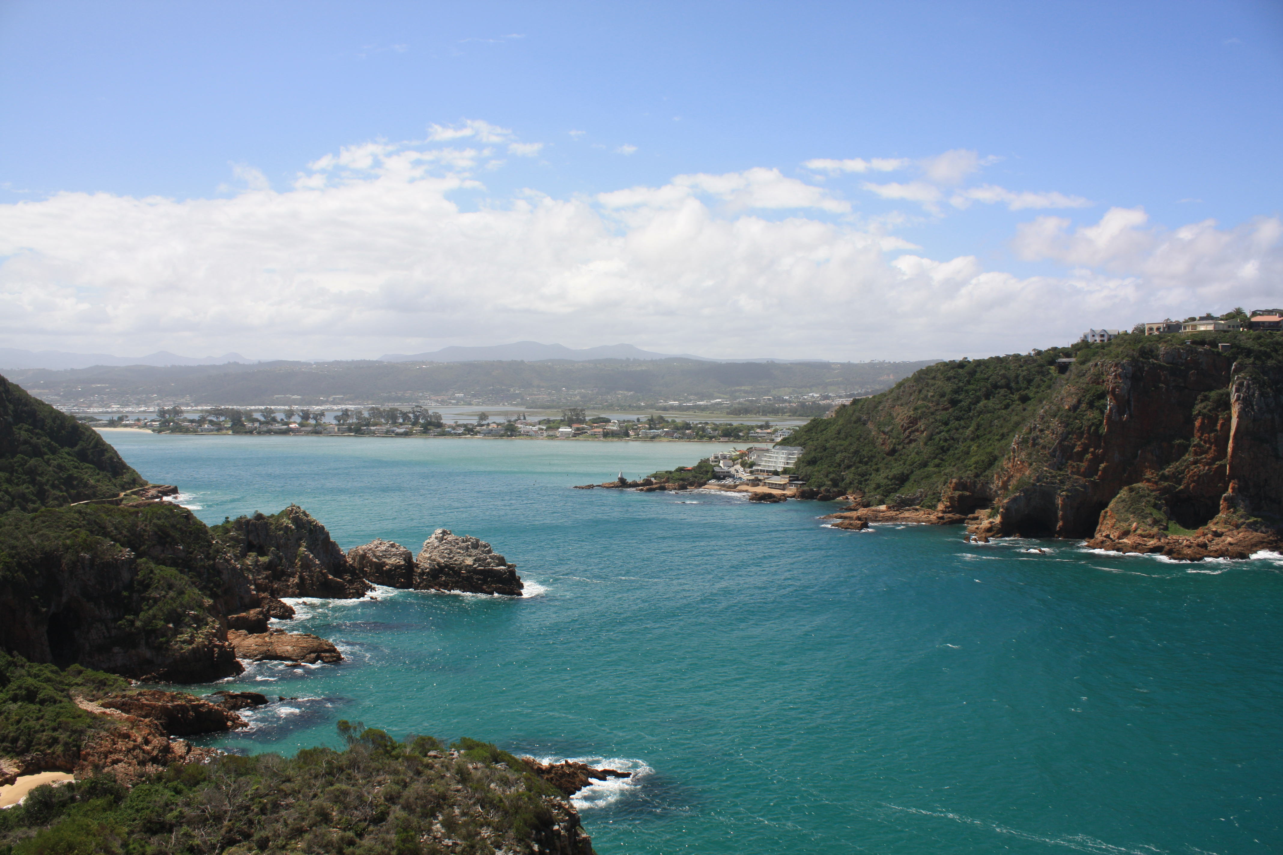 Knysna